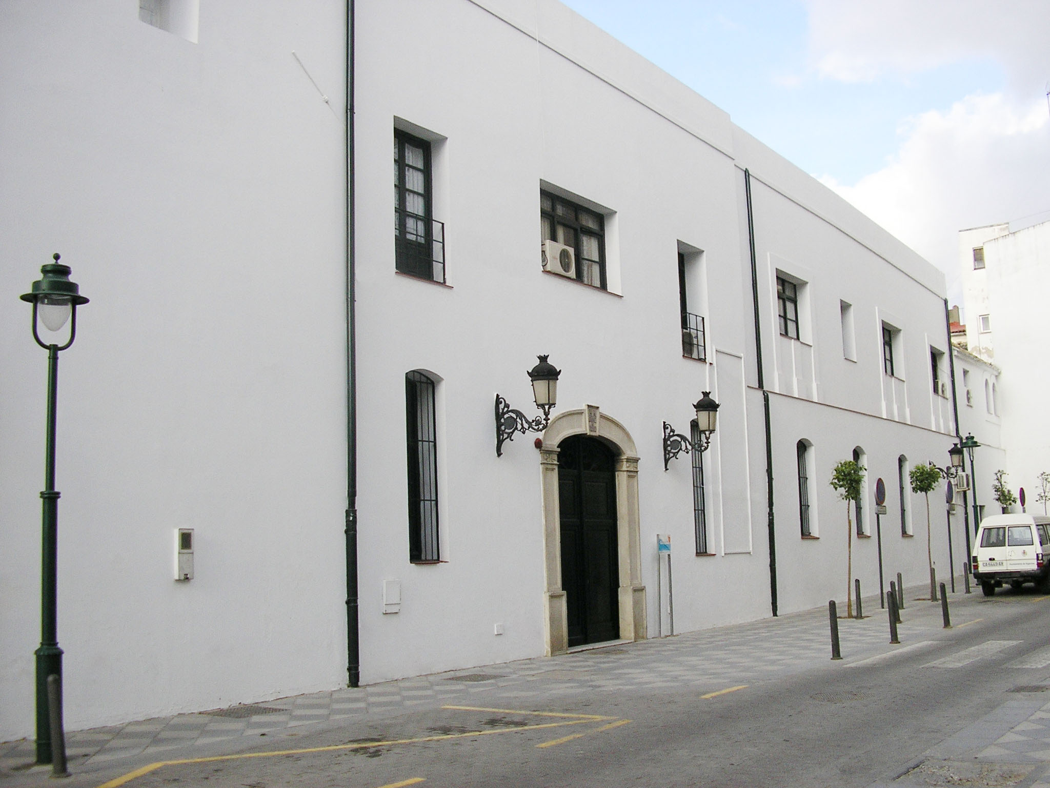 Fachada del Hospital de La Caridad de Algeciras, Andalucía, España